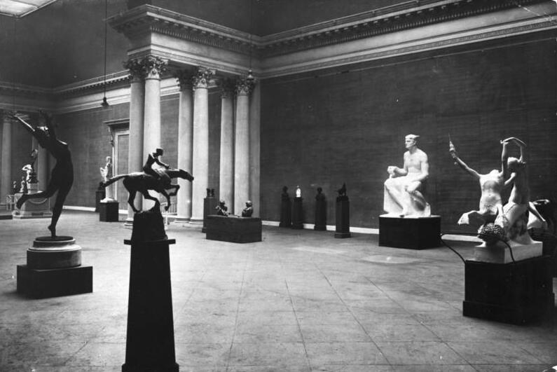 ADN-ZB/Archiv Berlin: Große Berliner Kunstausstellung 1920. Blick in den Skulpturensaal. 5337-20